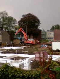 Bouw van appartementen en huizen in Hoogerheide Construction of appartments and houses in Hoogerheide